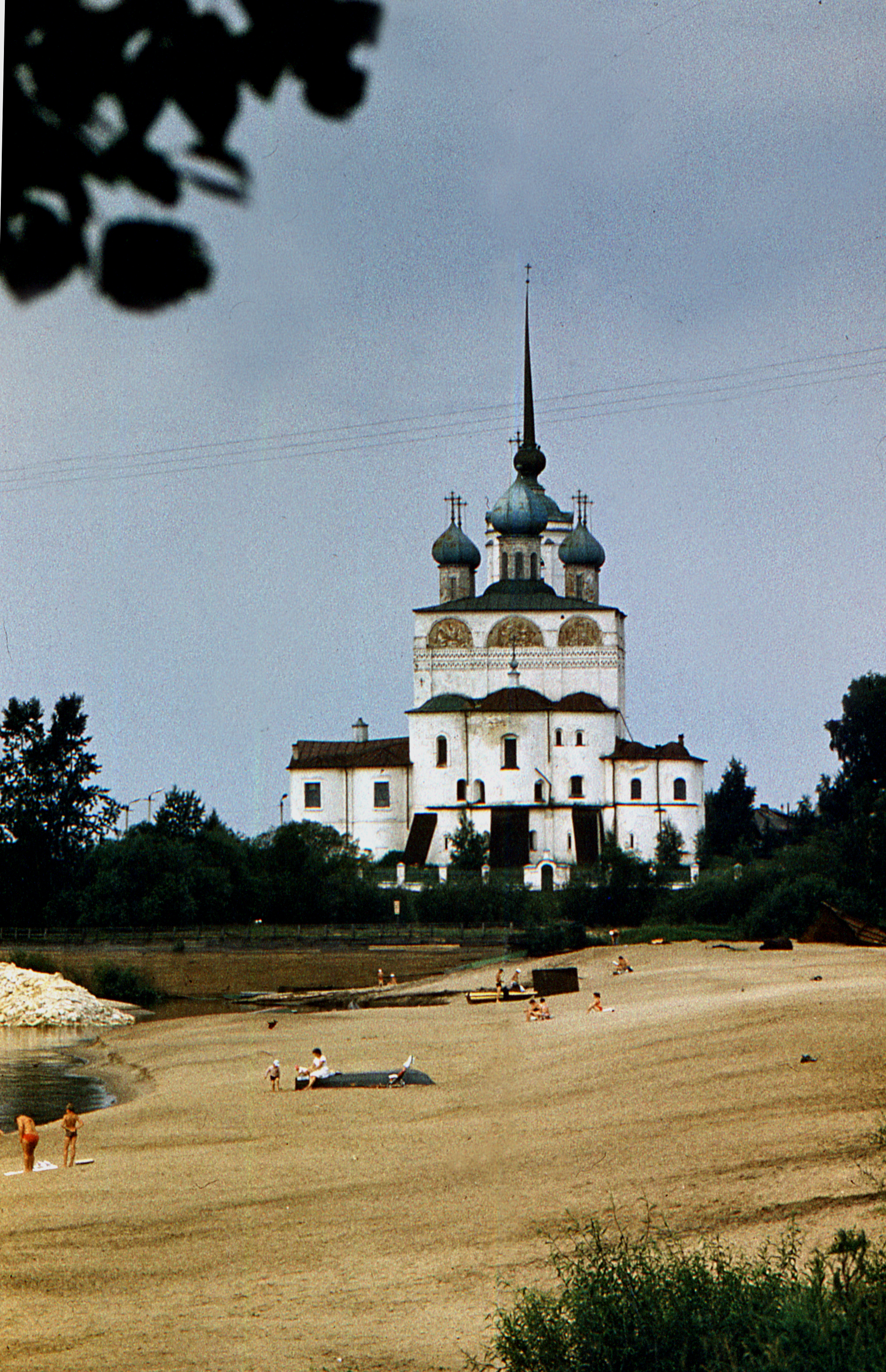 Сольвычегодск. Благовещенский собор со стороны абсид.